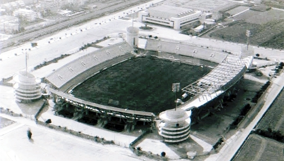 Stadio Riviera delle Palme fine anni ottanta, ampliamento e copertura della Tribuna ovest e costruzione delle quattro torri d'angolo.